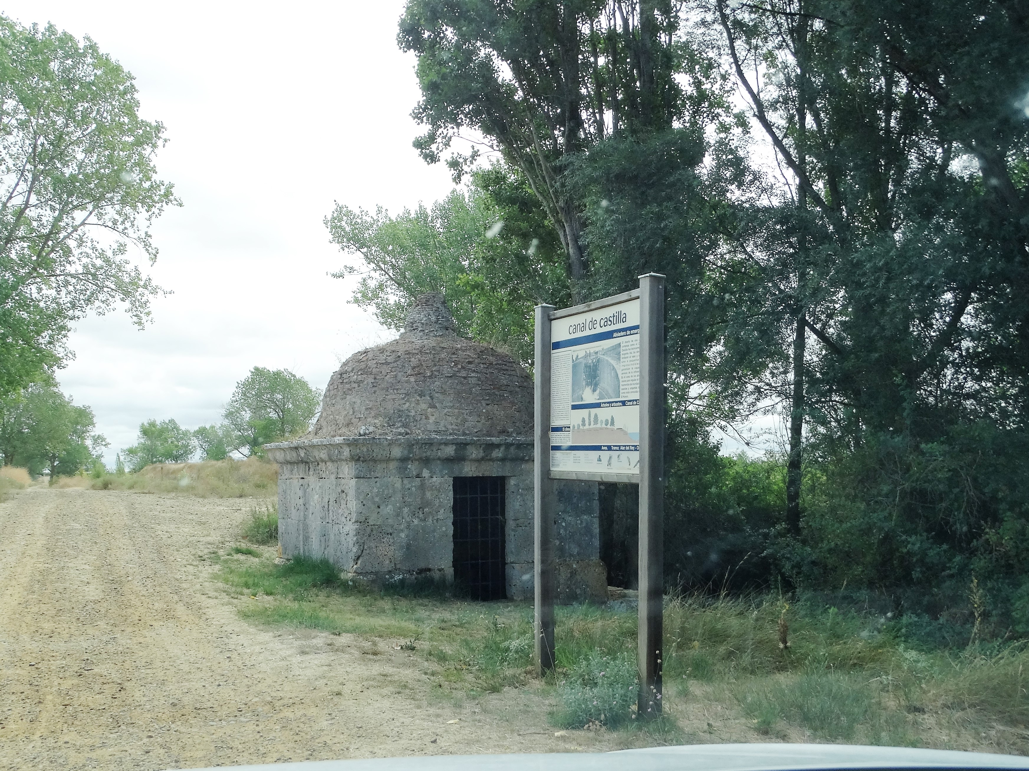 Caseta de control en el camino de sirga. Junto al Puente de Carrecalzada. Canal de Castilla.